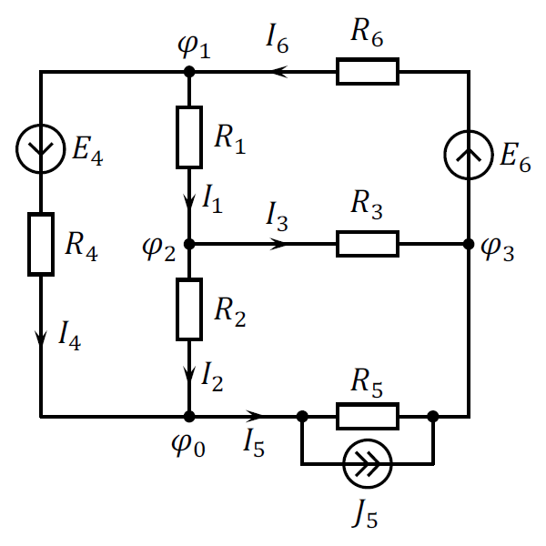 Пример линейной электрической схемы